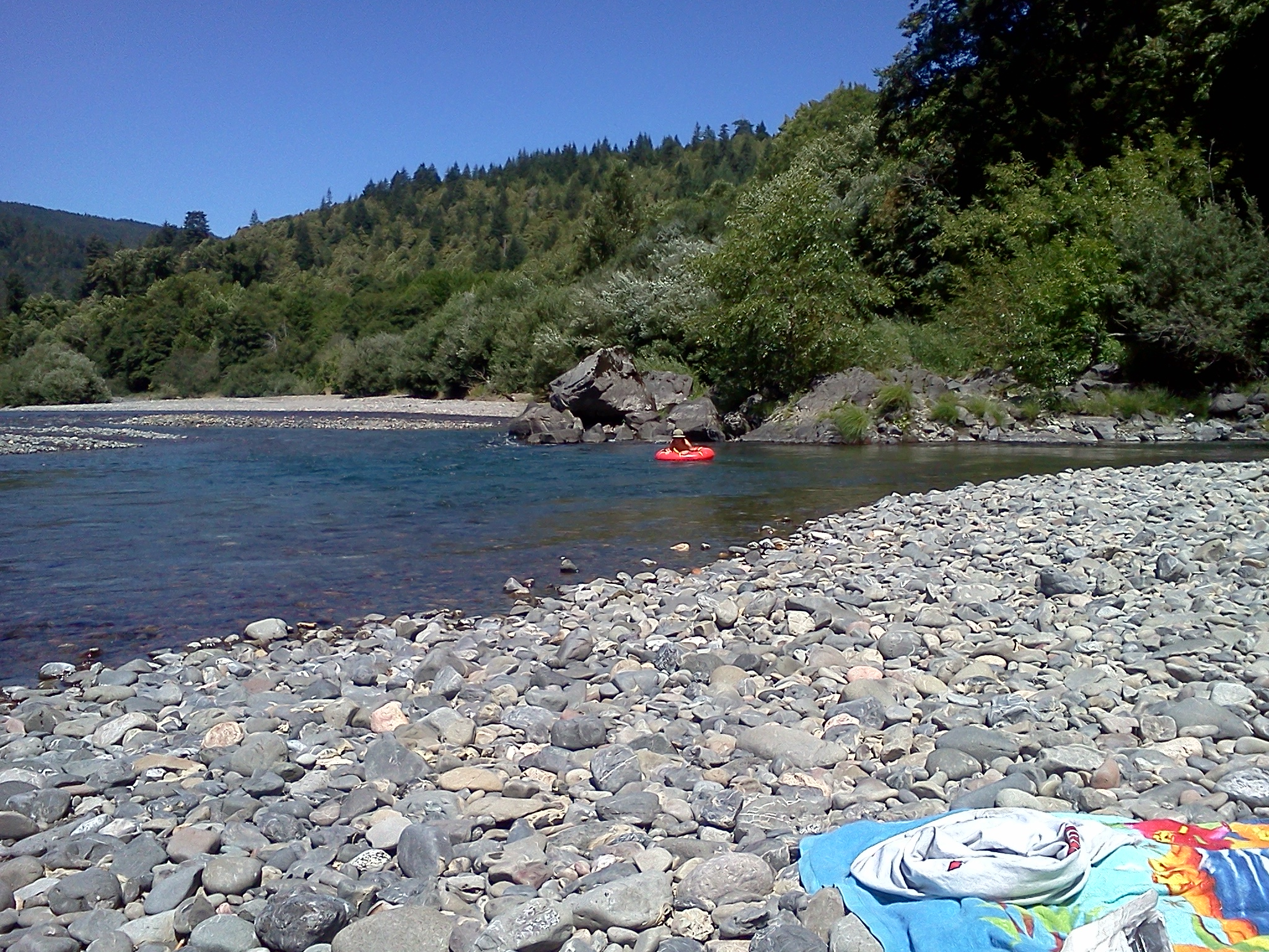 IMG_20110811_121801